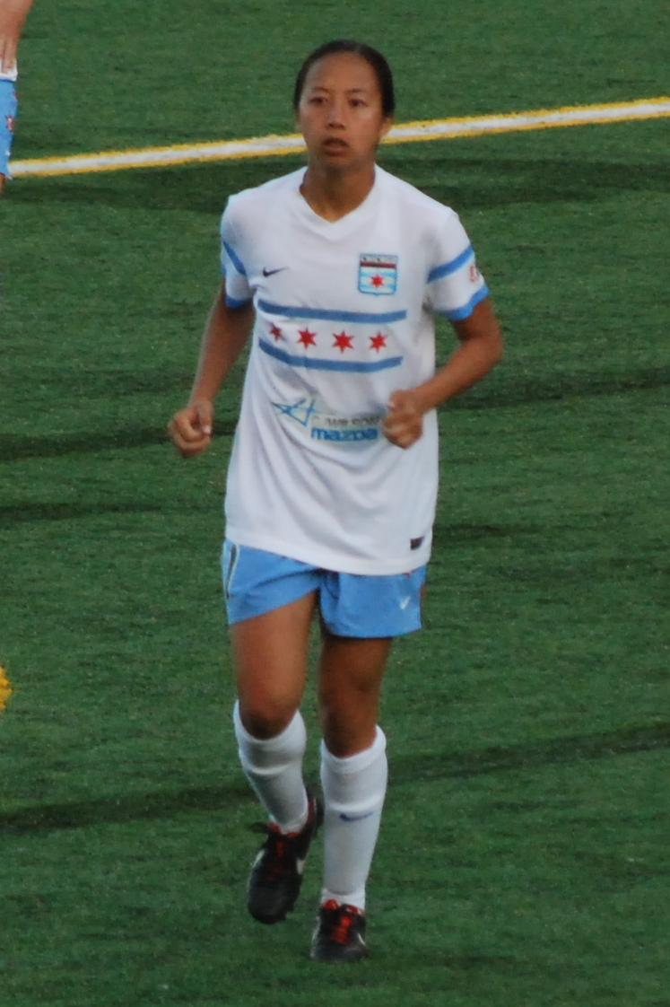 Rachel Quon (2014)